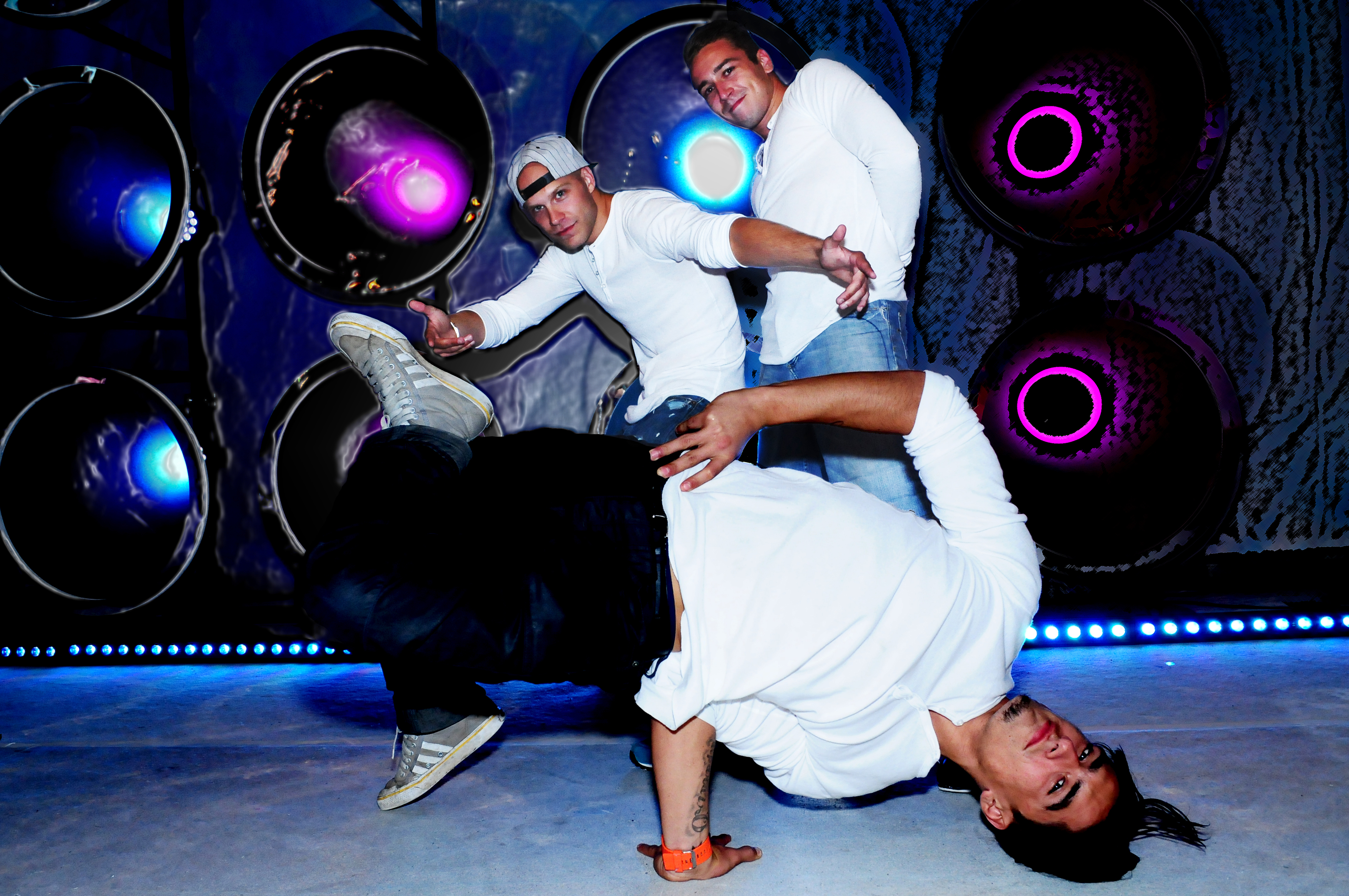 Grounded breakar loss på Sommarkrysset